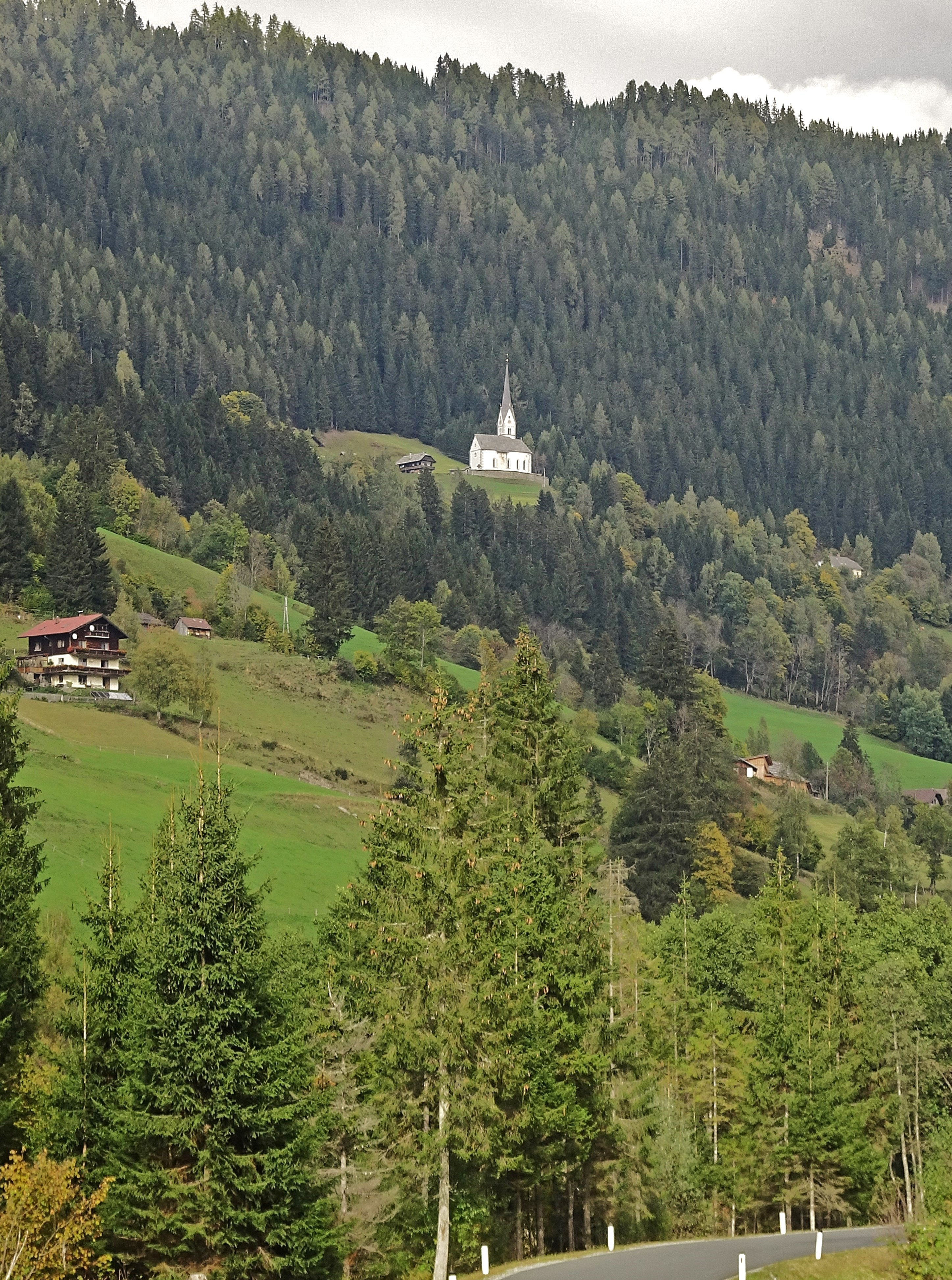 Kath. Pfarrkirche Hll. Rupert und Virgil in Außerteuchen, Ansicht vom Tal